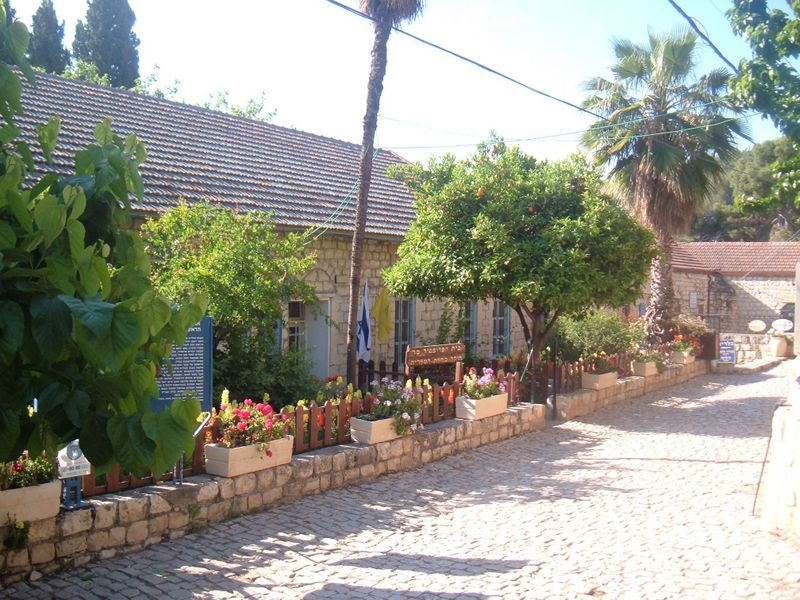 The house of Dr. Gideon Mer, reconstruction site, Rosh Pina, Israel. בית הדוקטור גדעון מר, הלוחם במלריה, אתר השחזור ראש פינה, ישראל